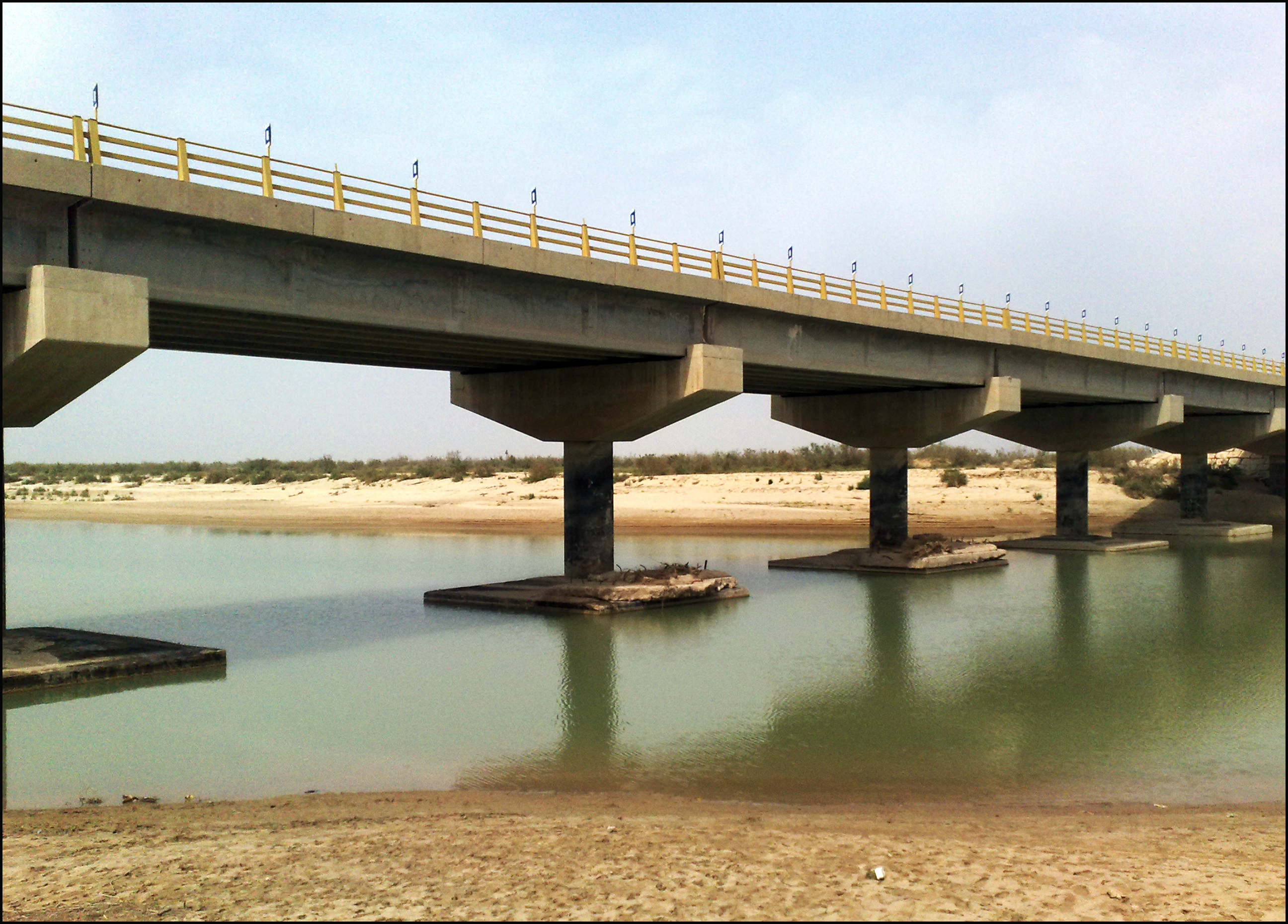 Mond River پل رودخانه مند